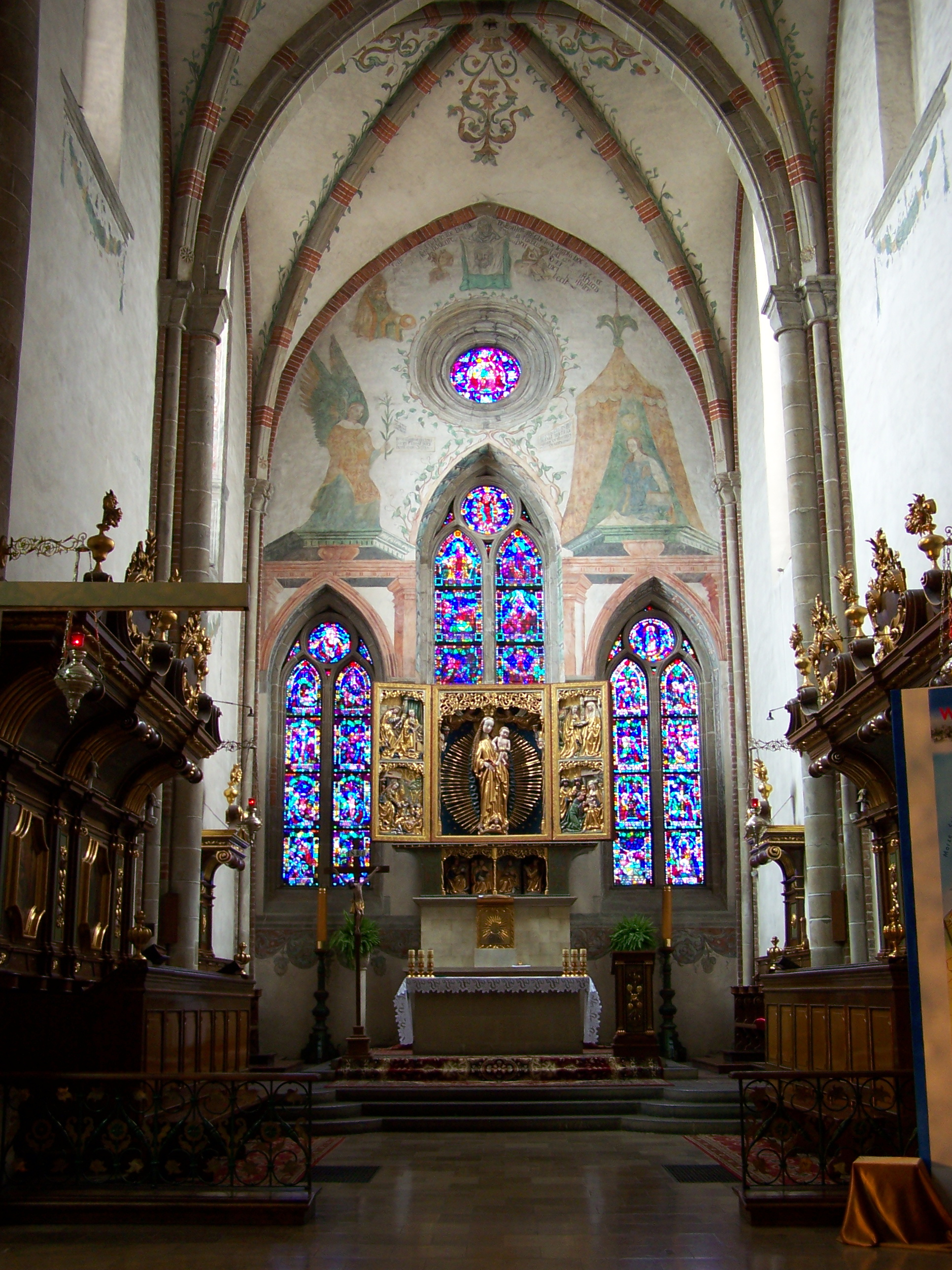 Prezbiterium i ołtarz w kościele klasztornym w Mogile (dzielnica Krakowa).